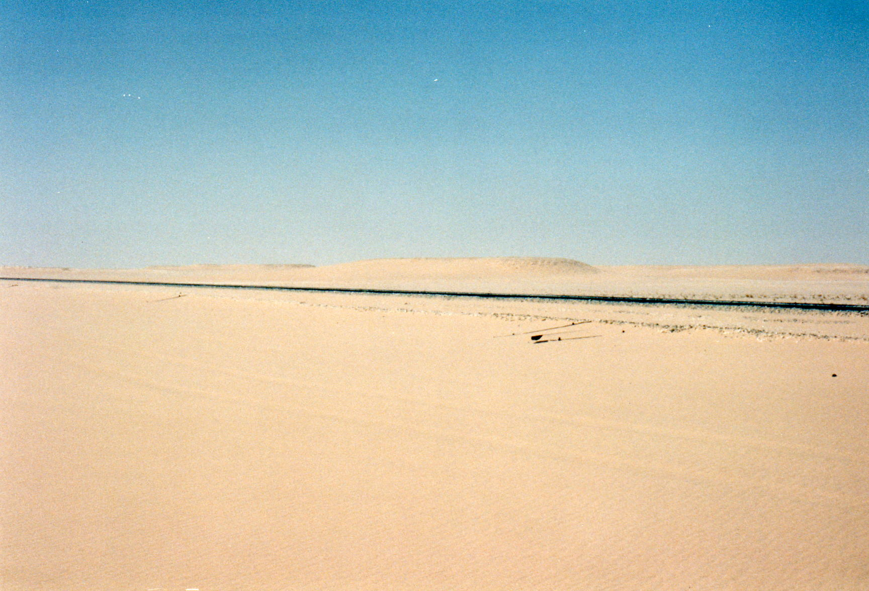 Frontera entre Mauritania y el Sahara Occidental en la zona de Guerguerat en 1995.